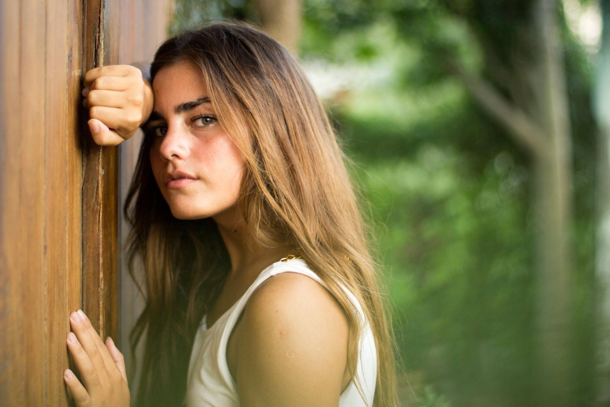 Девушка с длинными волосами